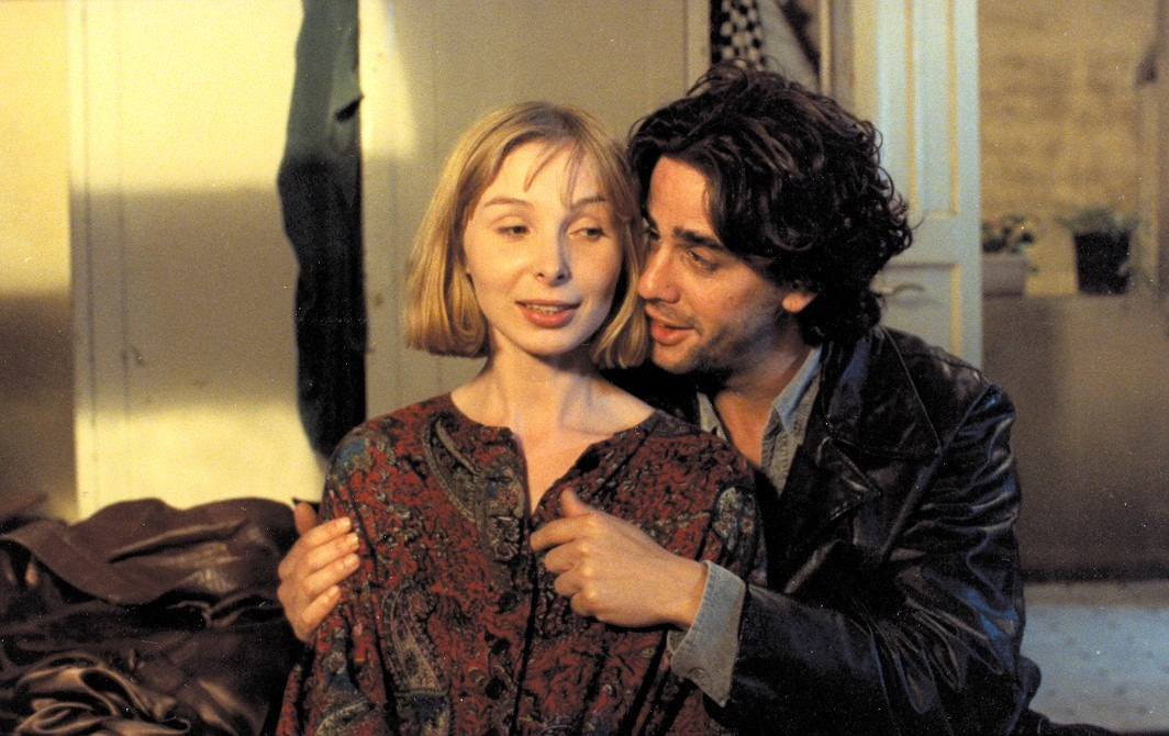 סרטו של אריק קפלון "החברים של יאנה", 1999